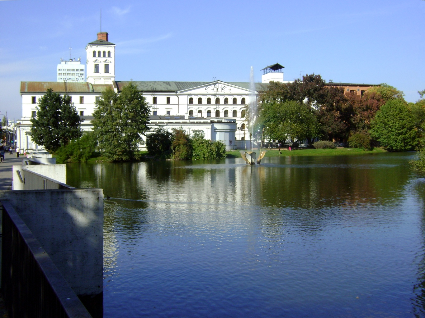 d. fabryka Ludwika Geyera (tzw. „Biała Fabryka”) ob. Centralne Muzeum Włókiennictwa: skrzydło zach. (A) skrzydło płn. (B) skrzydło płd. (C) budynek kotłowni Piotrkowska 282/284, Miasto Łódź